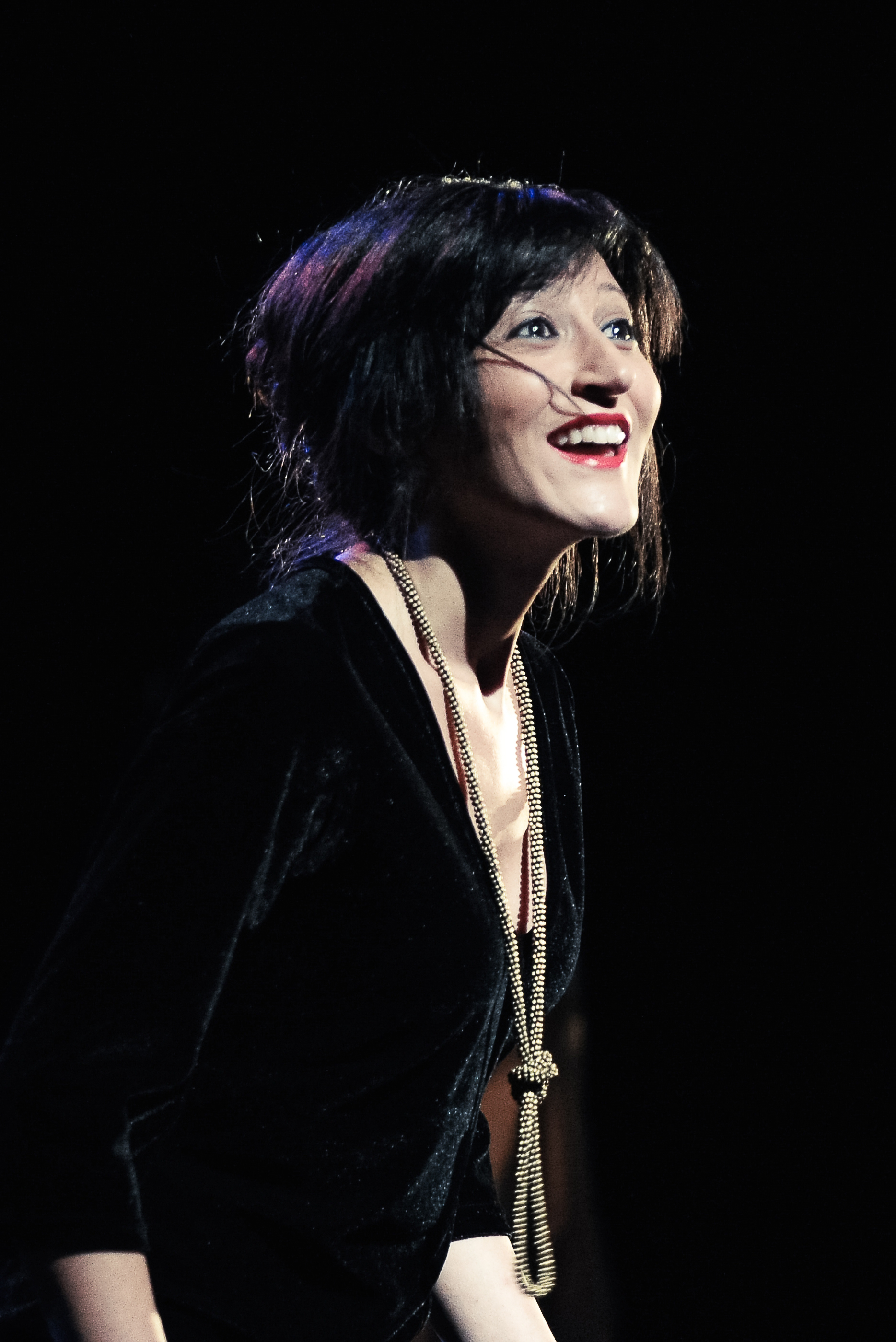 Terry Paternoster in MEDEA BIG OIL Premio Scenario per Ustica XIV ed. - 26 luglio 2014, Rieti -RIC Festival Invasioni Creative